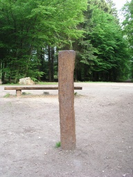 'Eiserner Mann' Kottenforst Bonn, Germany